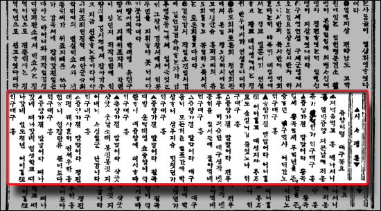 박중양을 풍자한 노래가 실린 기사(1909년 1월 16일자 대한매일신보 2면)